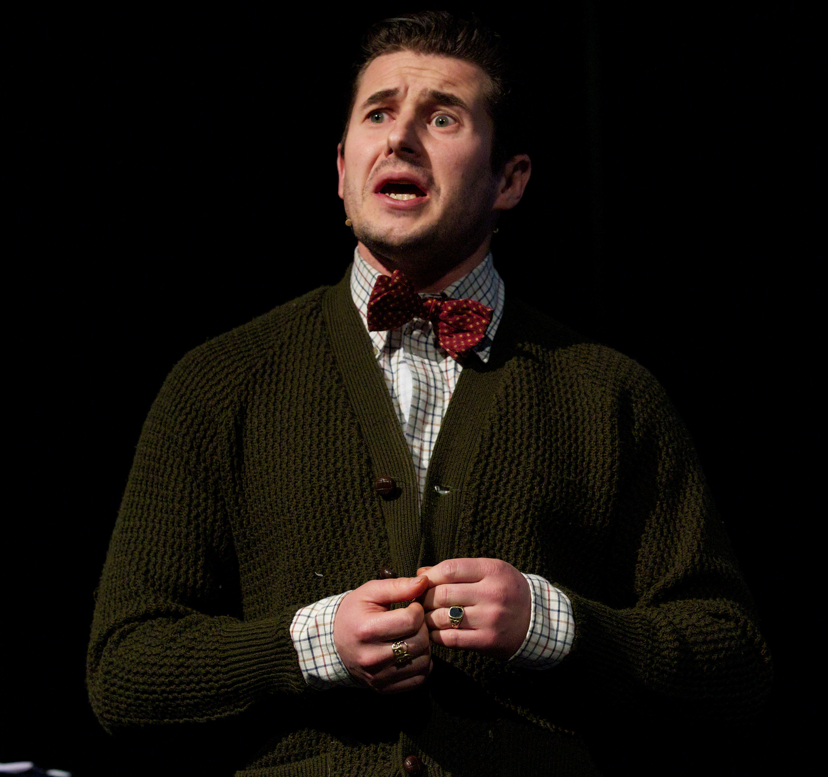 PR i praksis.